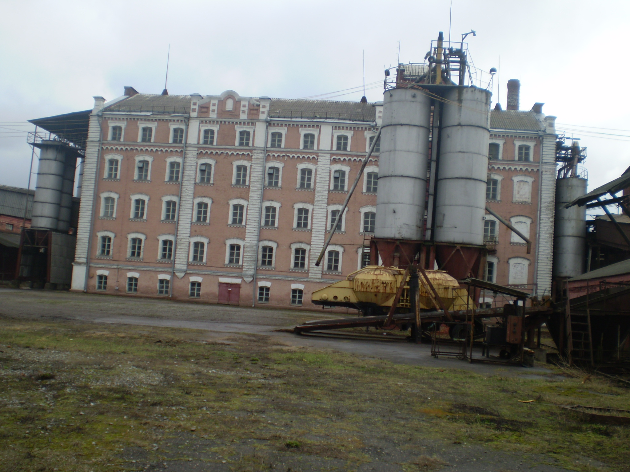 Фотографія готувалась для книги про архітектуру Роменщини "Кам'яна симфонія"